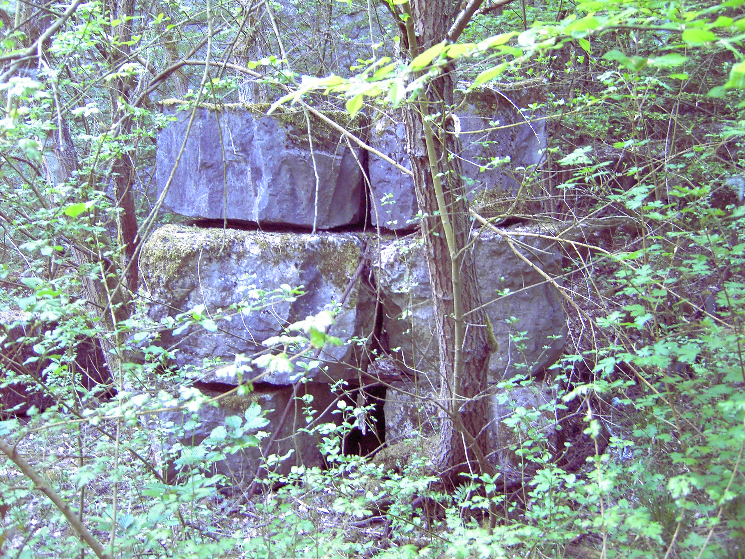 Blausteinblöcke in Naturschutzgebiet „Schomet“ bei Stolberg (Rheinland), Deutschland